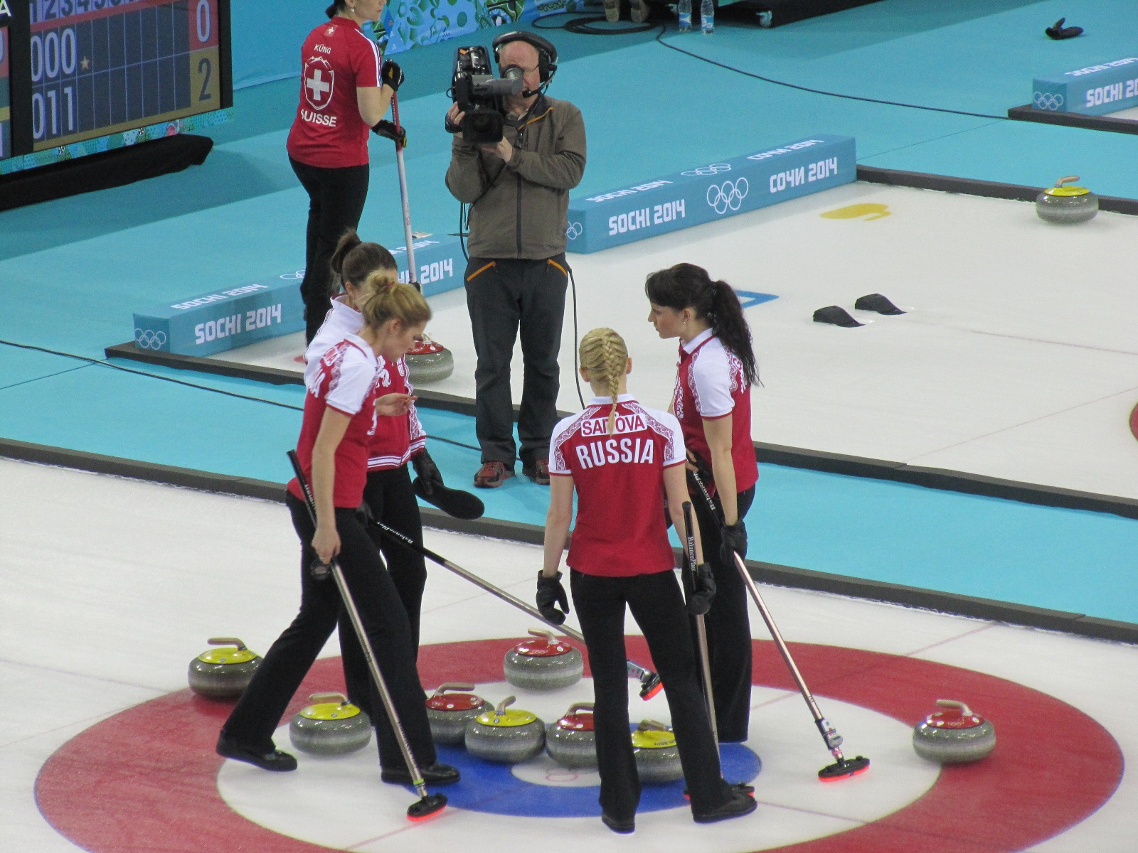 Кёрлинг. Зимние Олимпийские игры в Сочи